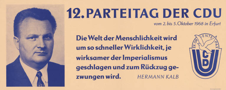 12. Parteitag der CDU ... Die Welt der Menschlichkeit wird um so schneller Wirklichkeit, je wirksamer der Imperialismus geschlagen und zum Rückzug gezwungen wird. Hermann Kalb Abbildung: Parteilogo - Porträtfoto Hermann Kalb Plakatart: Kandidaten-/Personenplakat mit Porträt Drucker_Druckart_Druckort: III-9-19 Ag 224-100-68 7265 Objekt-Signatur: 10-024 : 3081 Bestand: Plakate aus der SBZ/DDR (10-024) GliederungBestand10-18: Ost-CDU / CDUD / Exil-CDU Lizenz: KAS/ACDP 10-024 : 3081 CC-BY-SA 3.0 DE